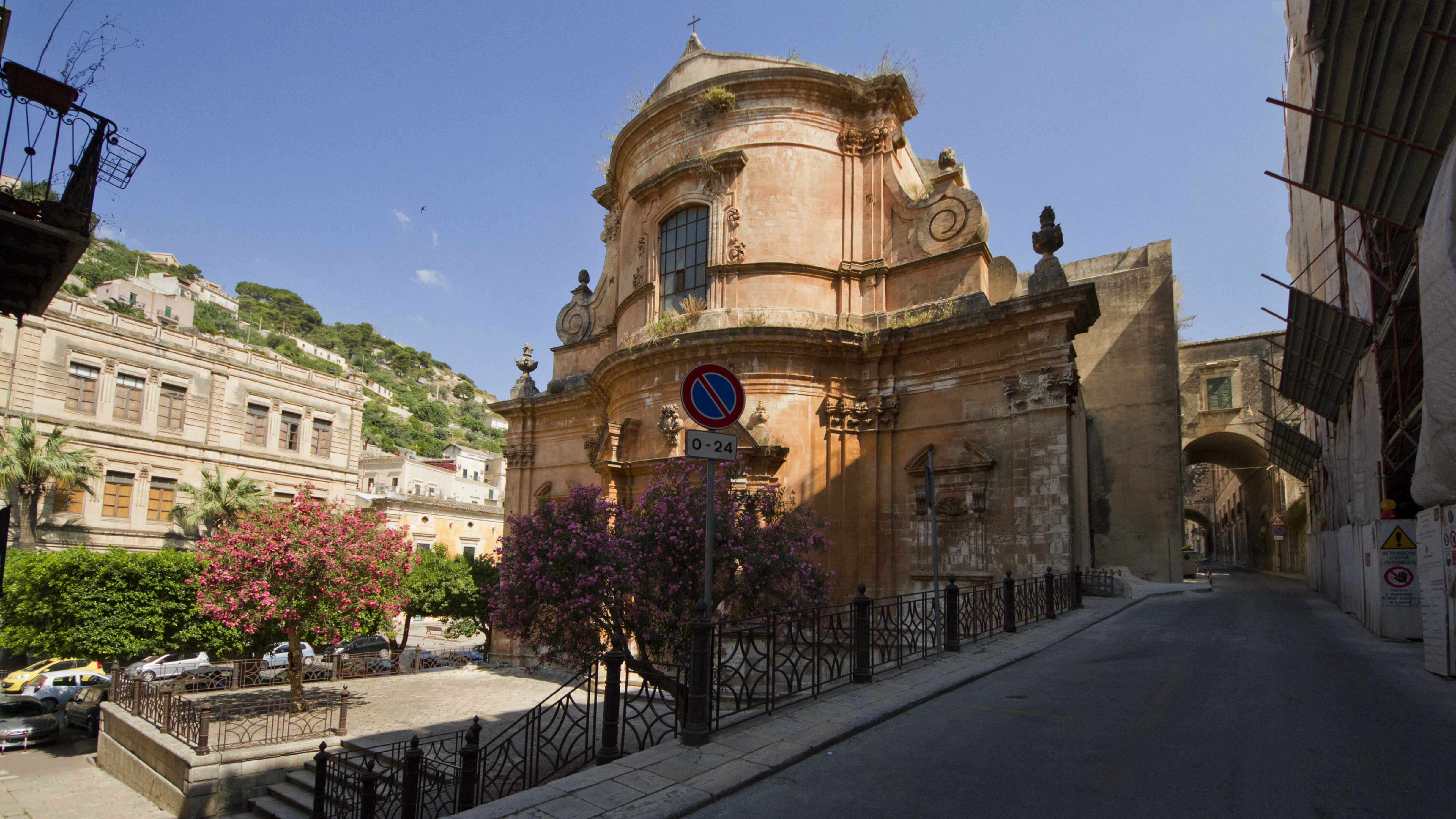 Chiesa Santa Maria del Soccorso, Modica, RG, Sicily, Italy